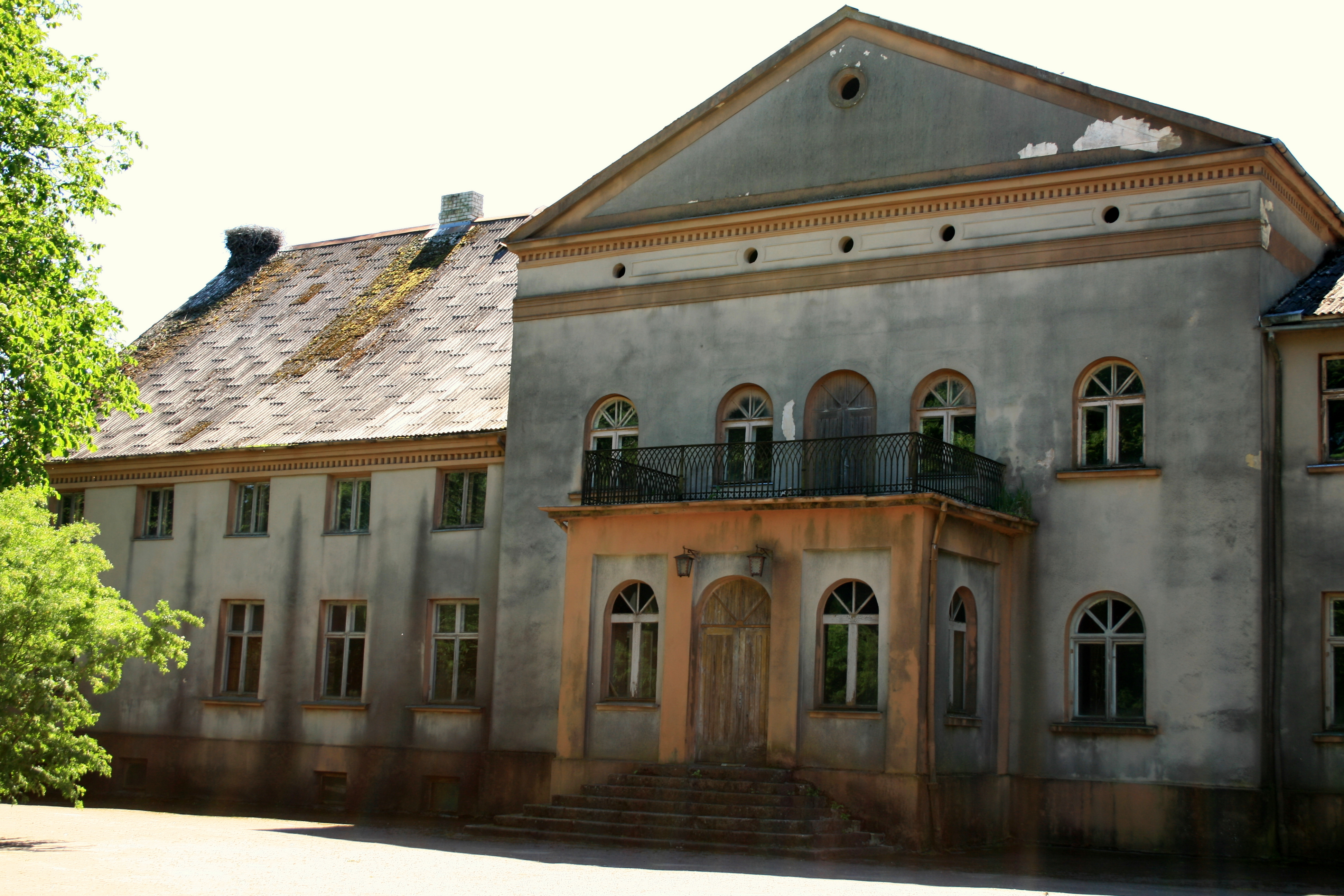 Puzenieki manor